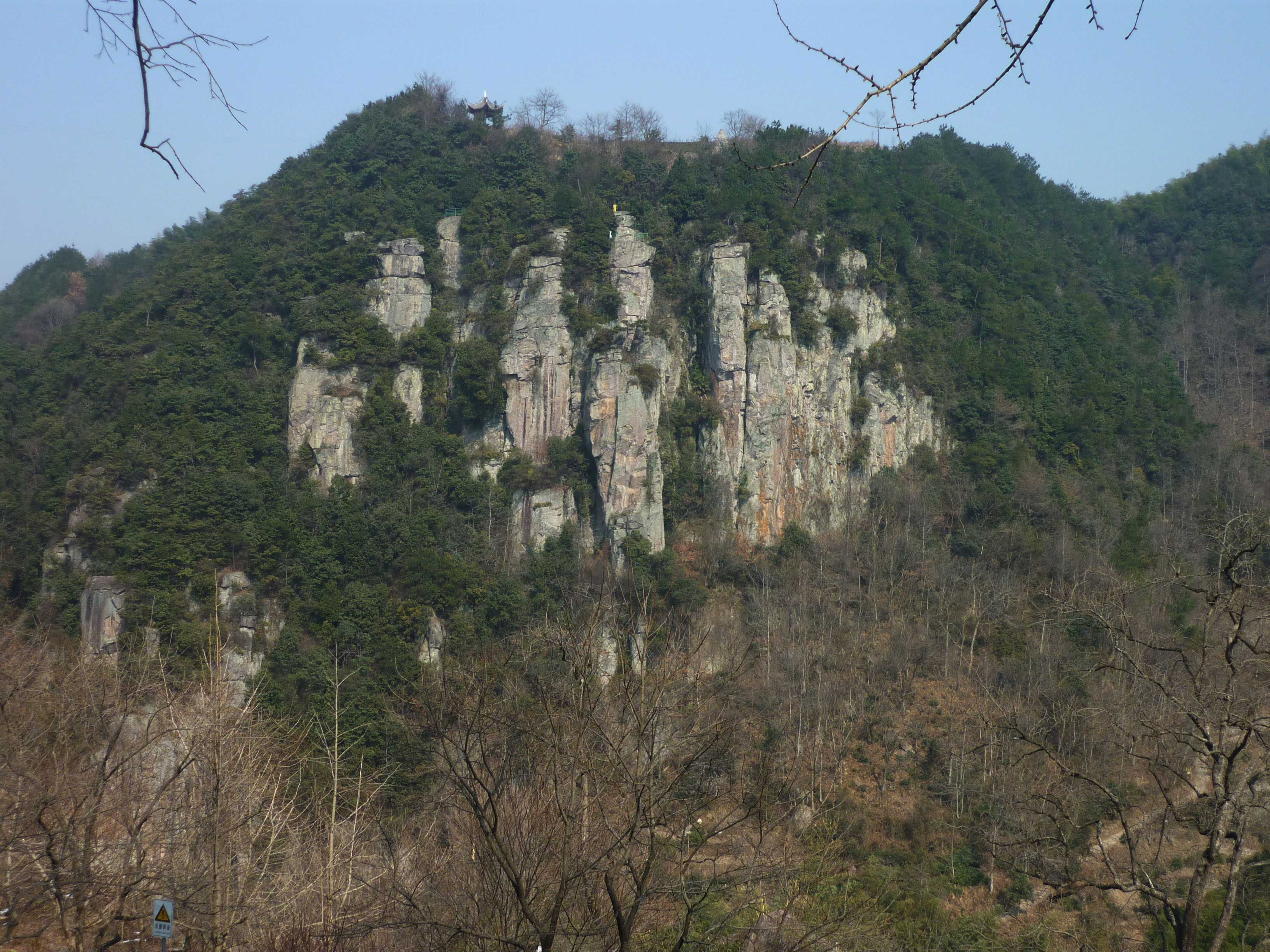 四明山丹山石壁